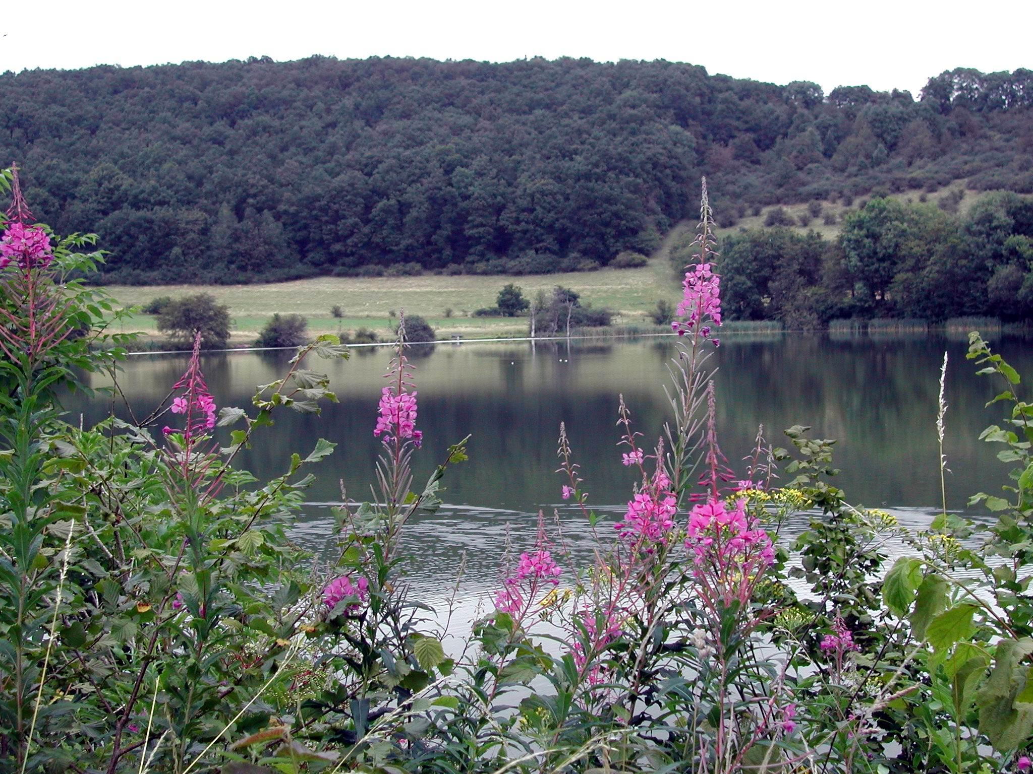 Motiv: Immerather Maar Ort: Immerath, Eifel Aufnahmedatum: August 2002 Kamera: Nikon 885